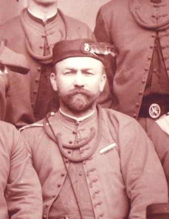 Vojtěch Bárta v sokolském kroji v roce 1896. Z rodinného archivu.